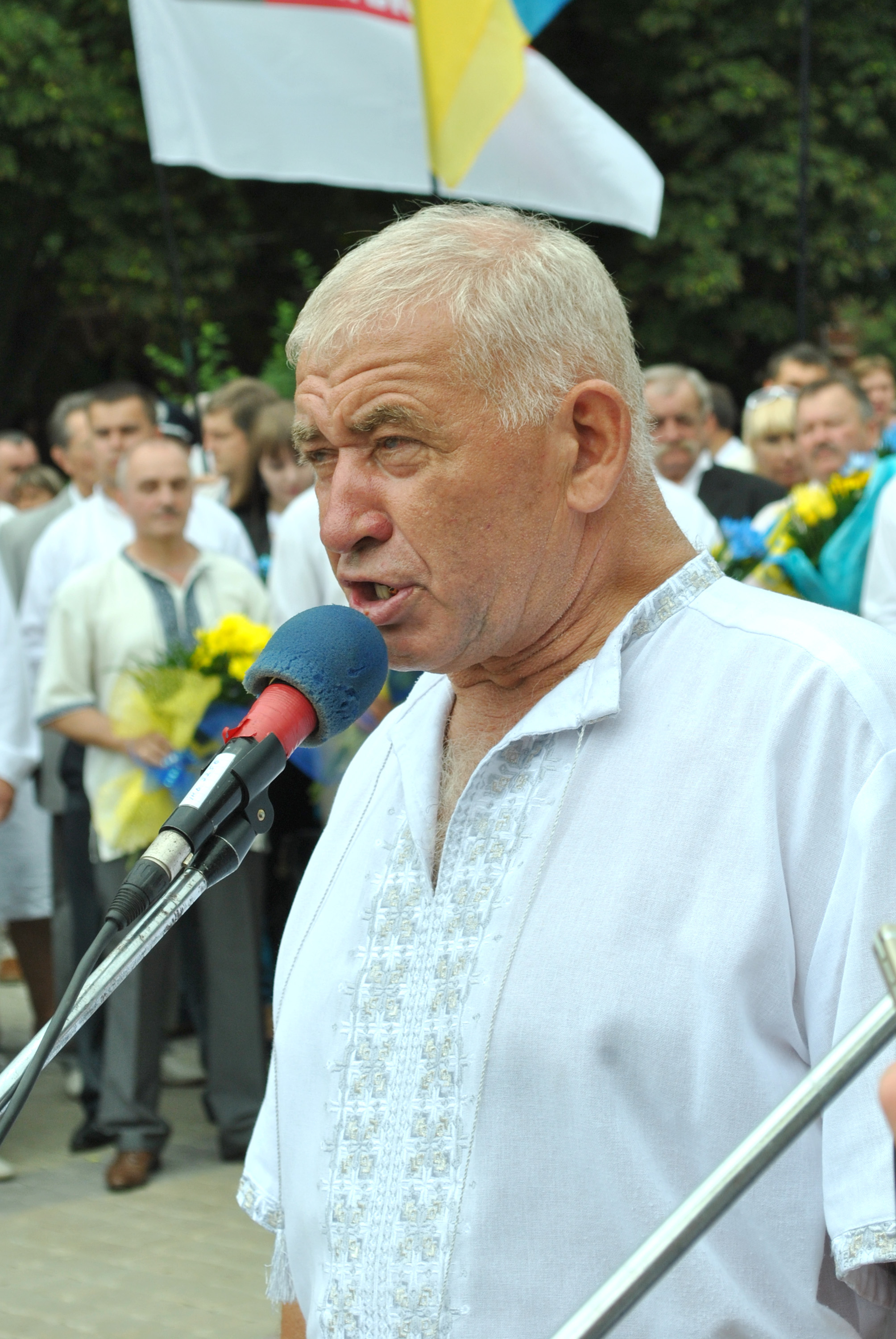 Український громадсько-політичний діяч, публіцист, літературознавець, педагог, народний депутат України 1-го скликання (від 1990), депутат Тернопільської міської ради (1990), Тернопільської обласної ради 2-го скликання (1994) Володимир Володимирович Колінець.